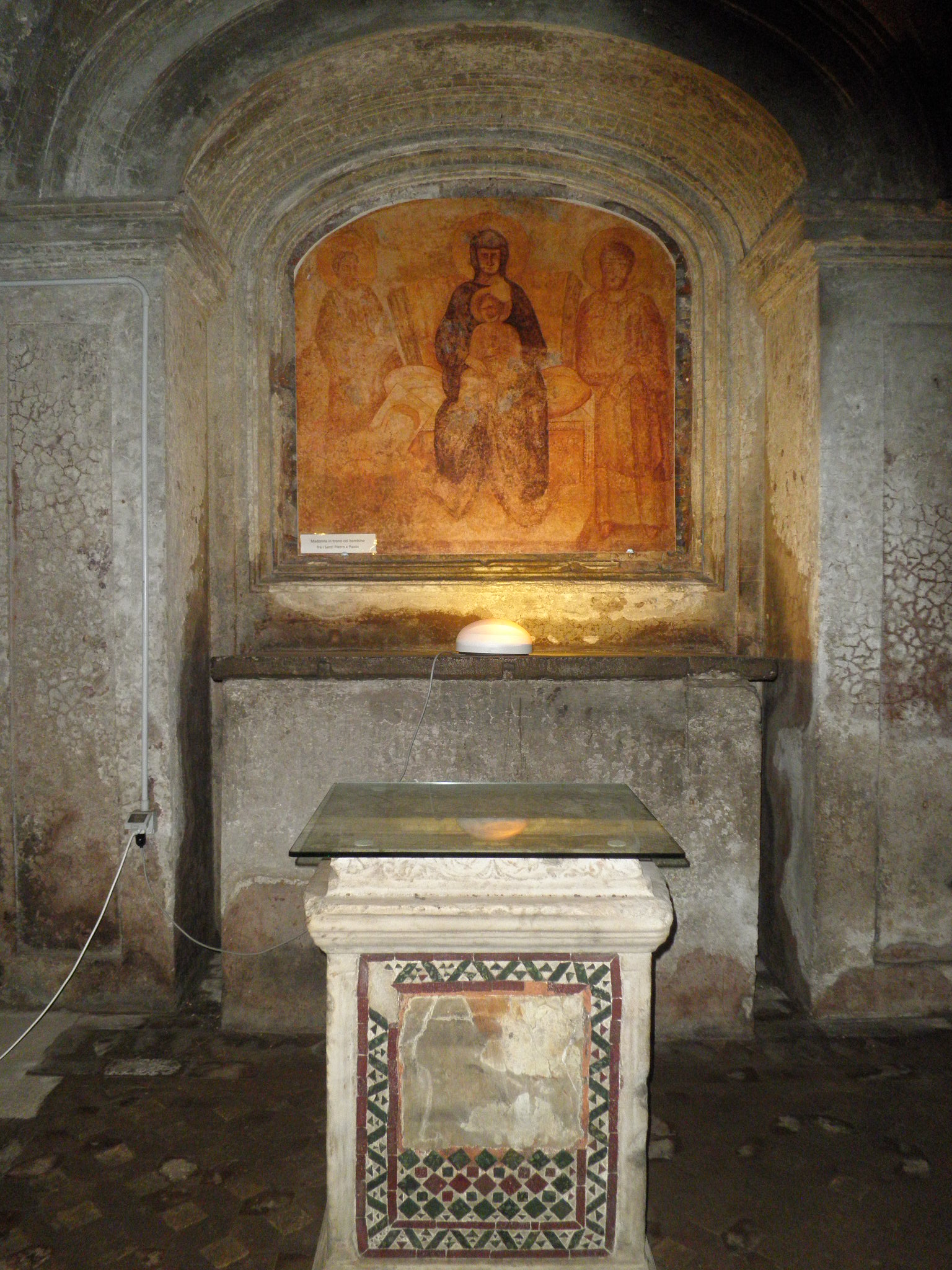 Roma, s. Maria in via Lata oratorio - altare e cippo romano "cosmatizzato"